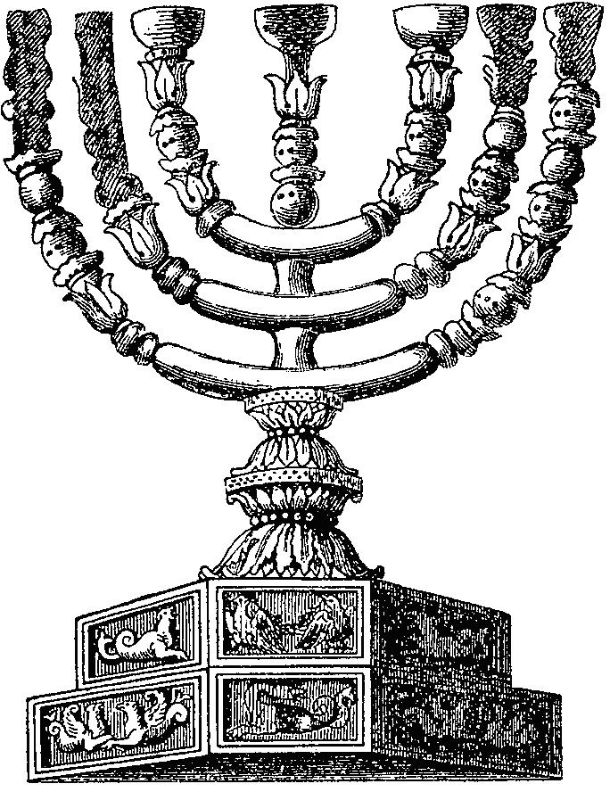 Менора на арке Тита в Риме